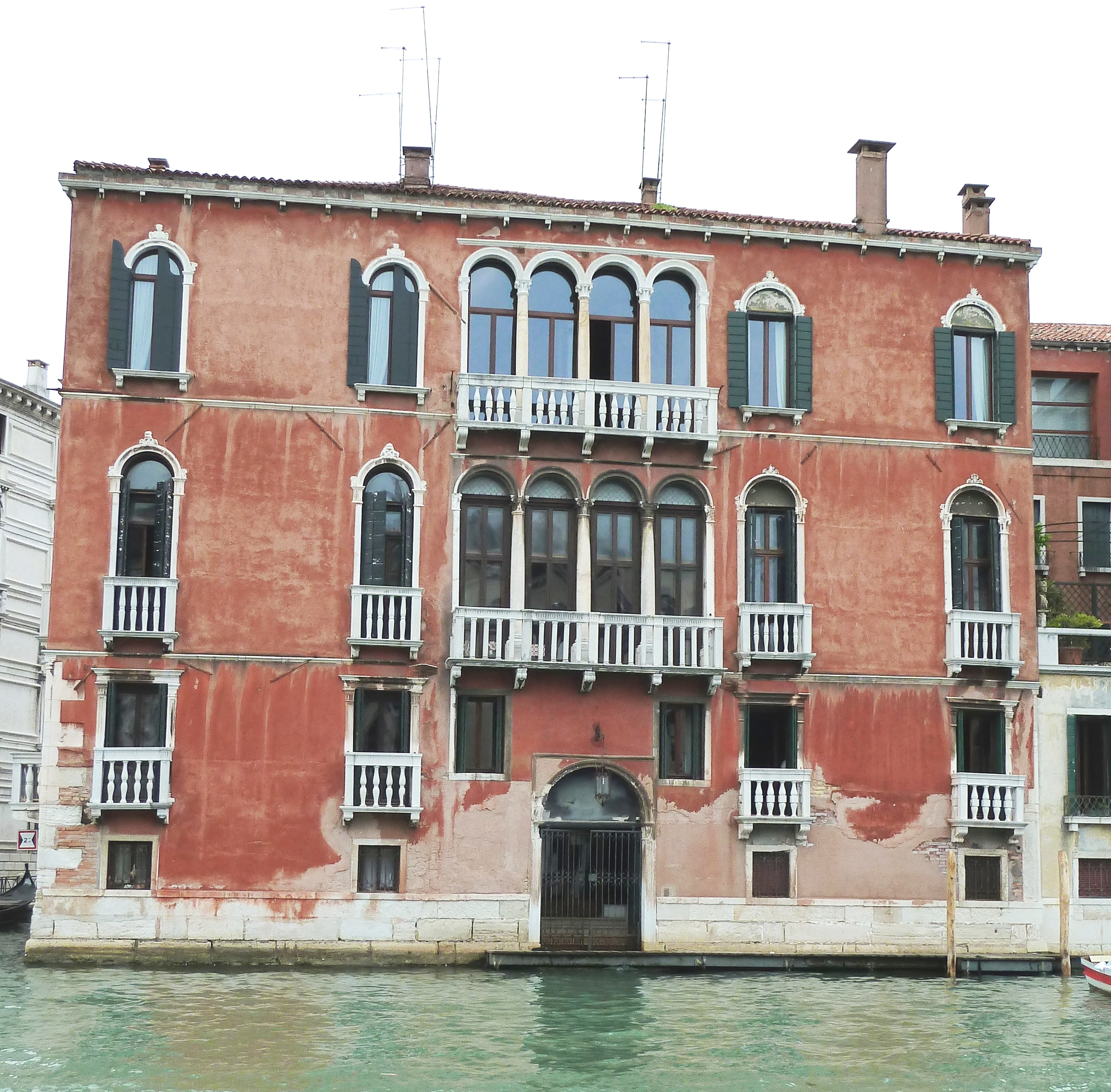 Palazzo Giustinian Persico